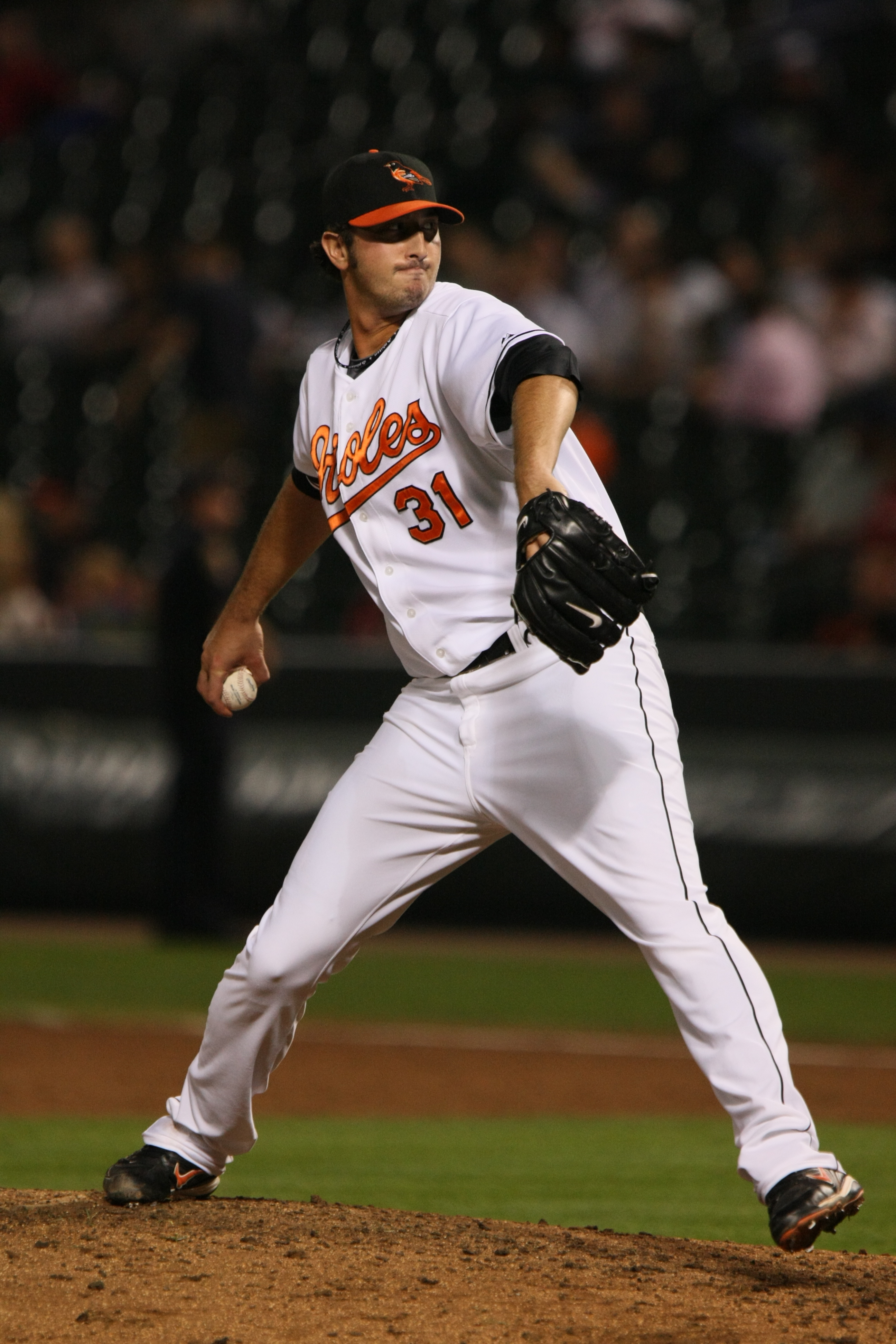 Kam Mickolio